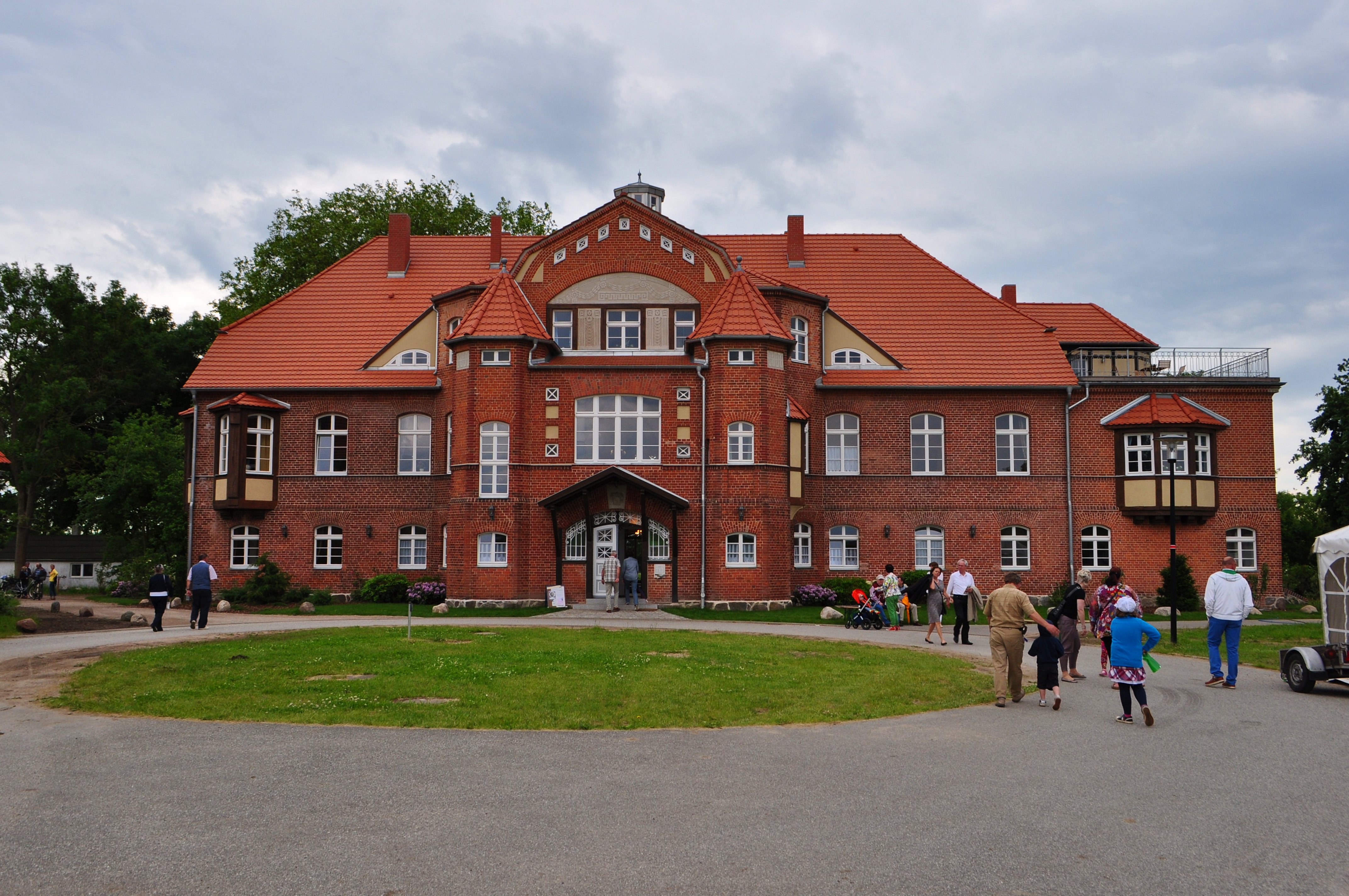 Gutshaus in Pütnitz (Ribnitz-Damgarten) Juni 2013. Vorderansicht. Foto am Tag der feierlichen Wiedereinweihung des restaurierten Gebäudes am 15.6.2013.